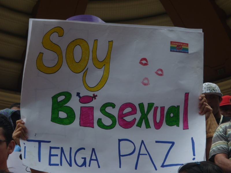 Marcha de las putas en Costa Rica, frente a la catedral metropolitana.